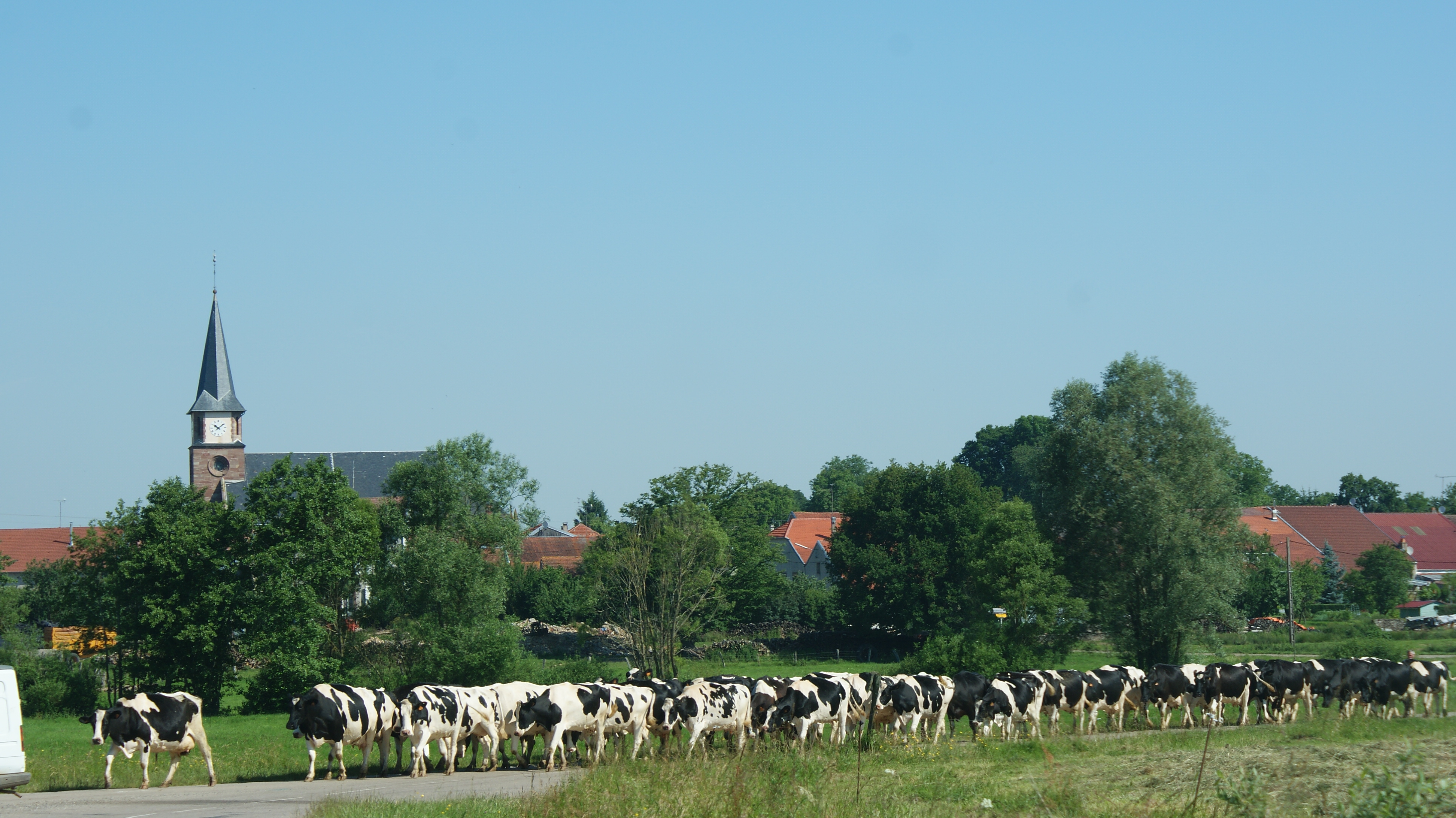 Sortie des vaches à Ancerviller